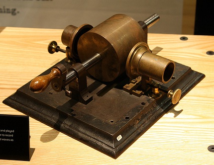 Primer fonógrafo de Thomas A. Edison (1877), ubicado en el Thomas Edison National Historical Park.